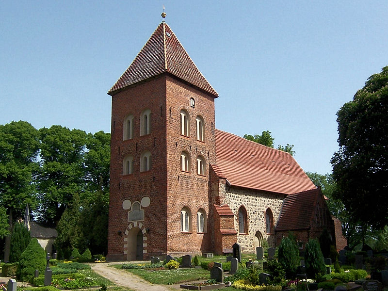 Kirche in Zittow, Landkreis Parchim